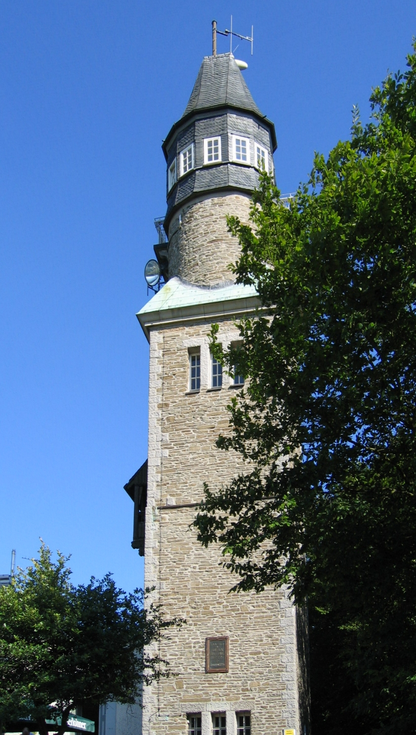 Danzturm in Iserlohn (Germany).